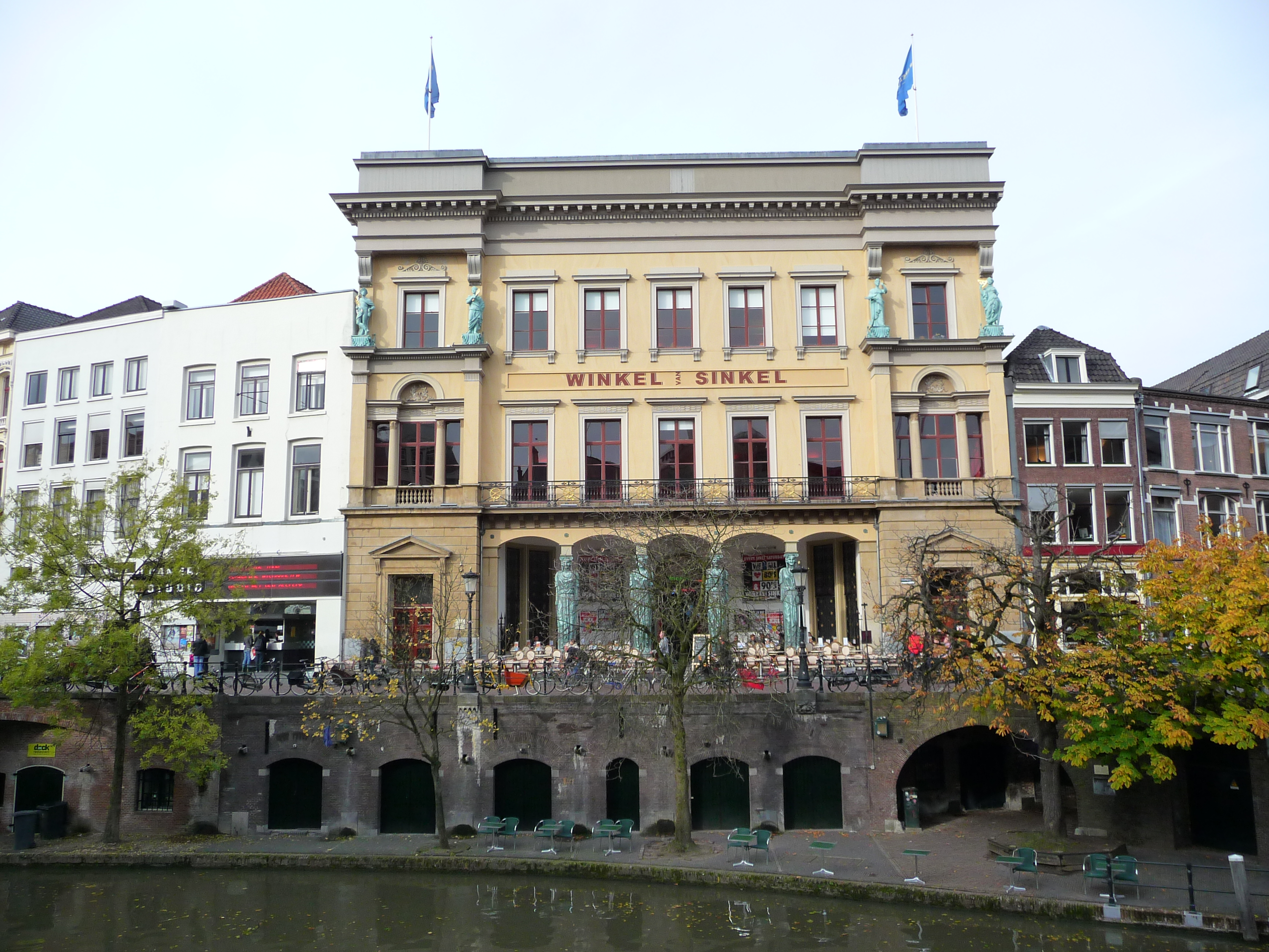 Rijksmonument aan de Oudegracht in Utrecht